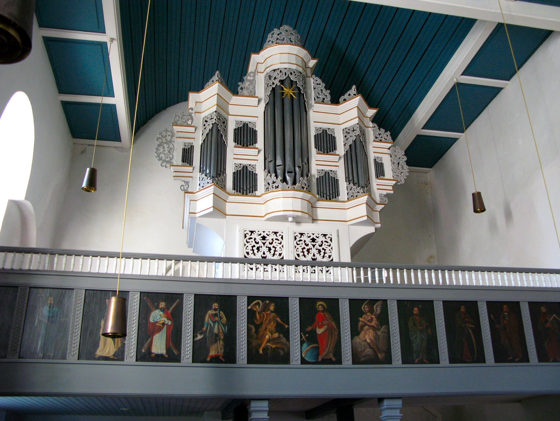 Orgel in Weene, Landkreis Aurich